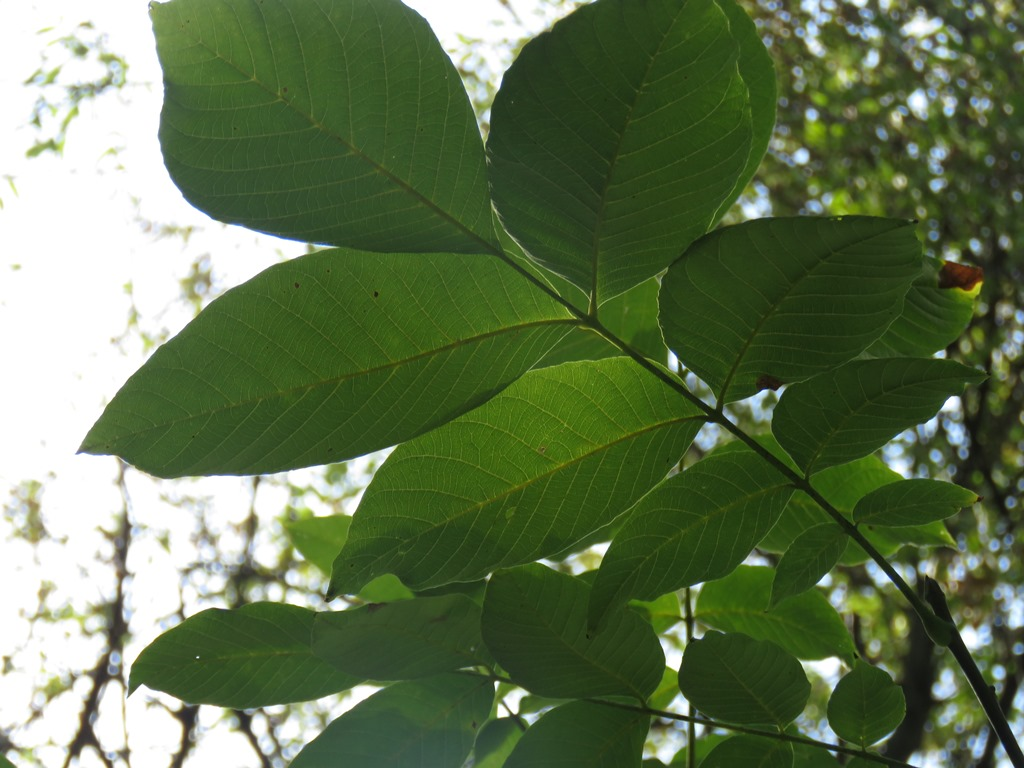 Srpski (latinica): Biljke parkova u Nišu